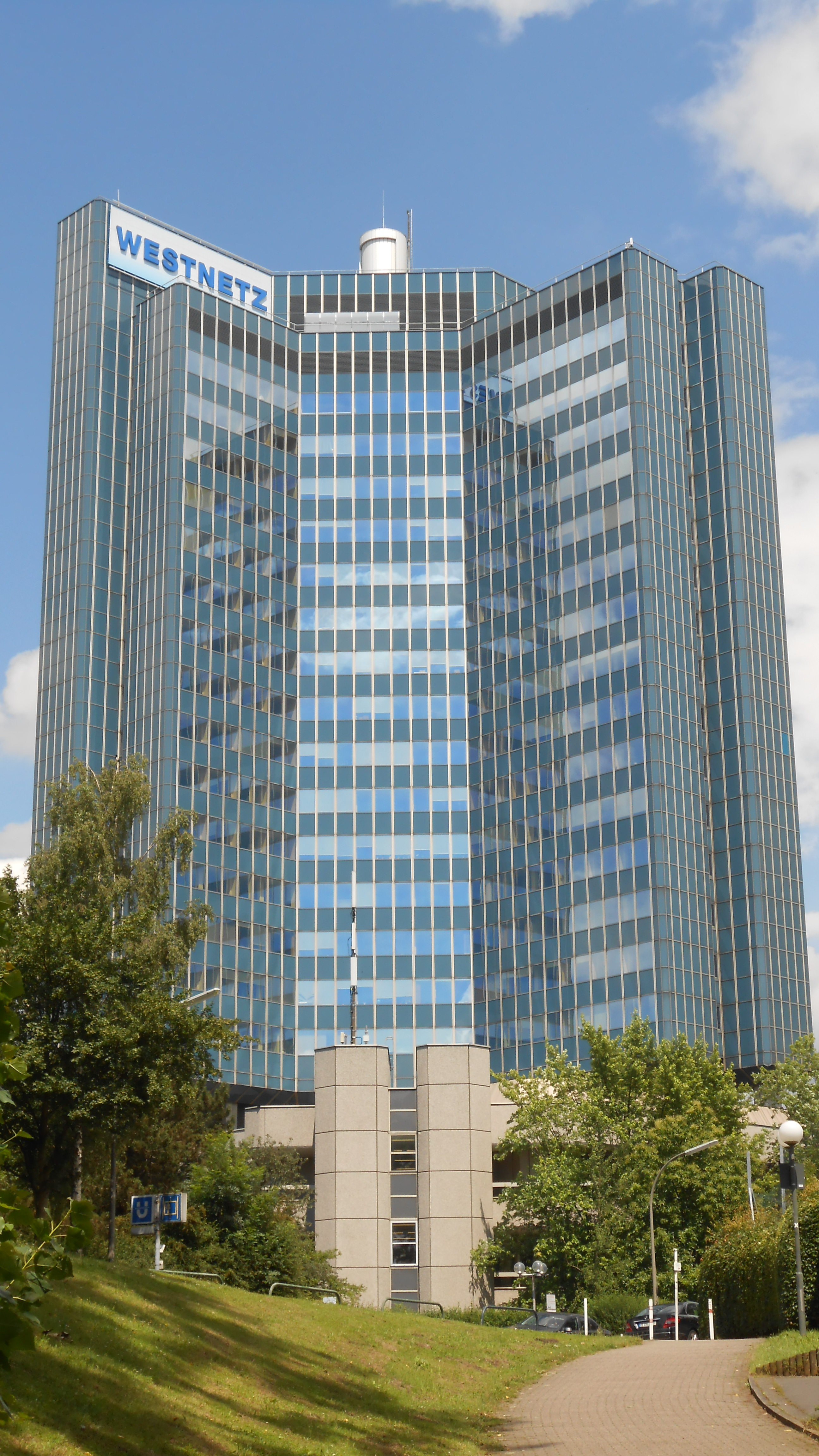 Das ehem. Telekom-Hochhaus, Sitz der Westnetz, eine RWE/Innogy-Tochterfirma.